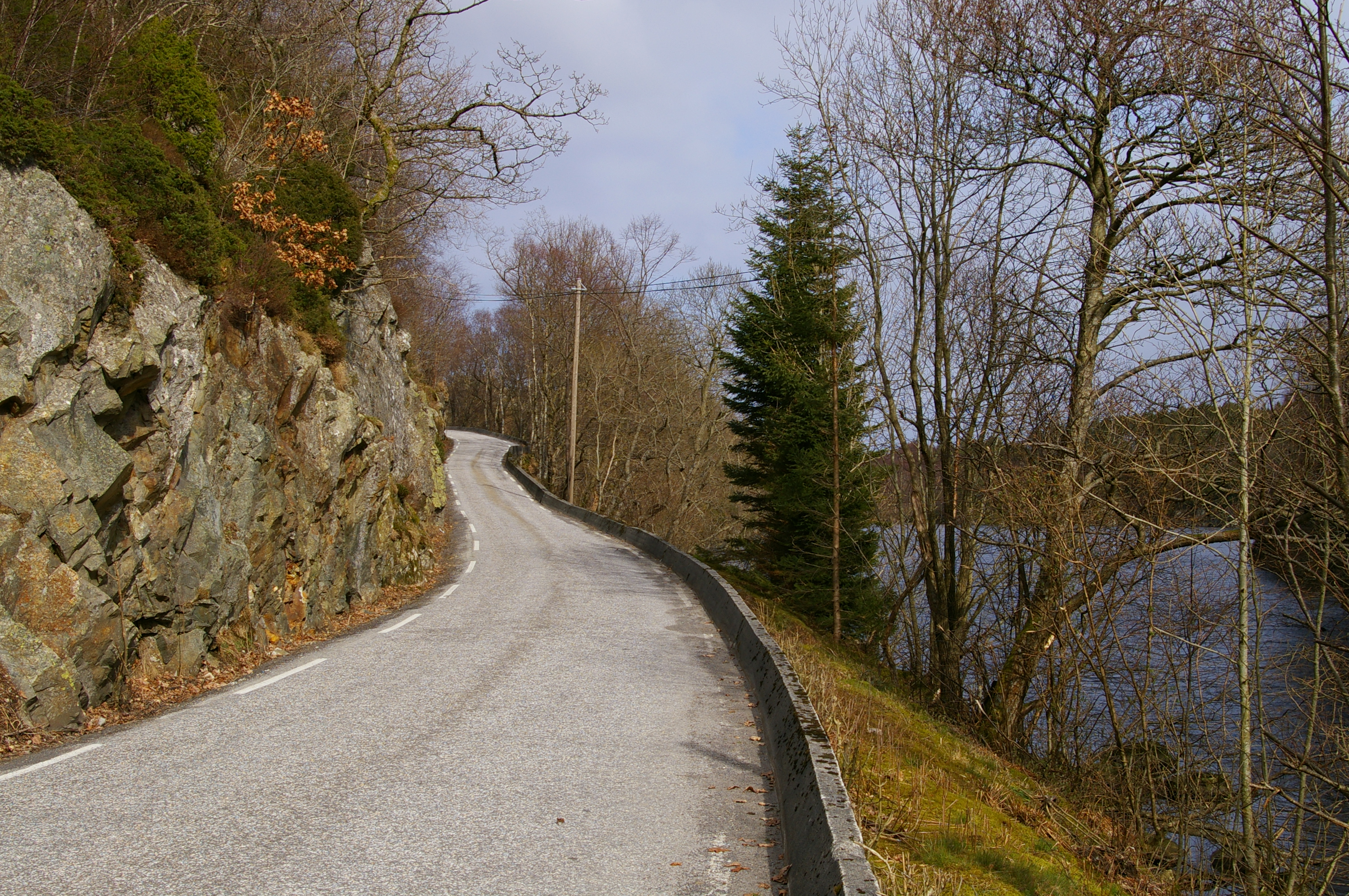 Fylkesvei 76 in Fitjar, Hordaland, Norway